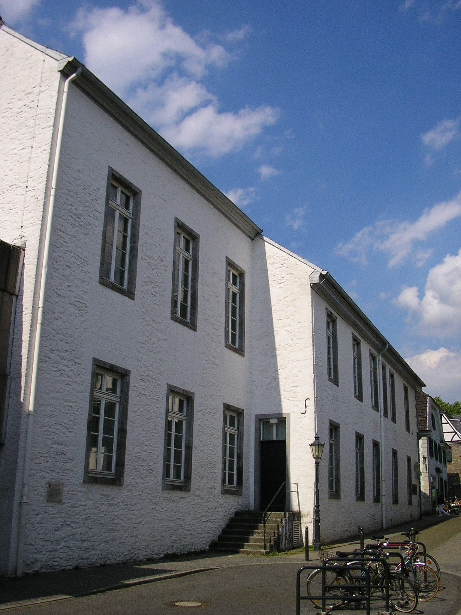 ehemaliges Minoritenkloster zu Ratingen